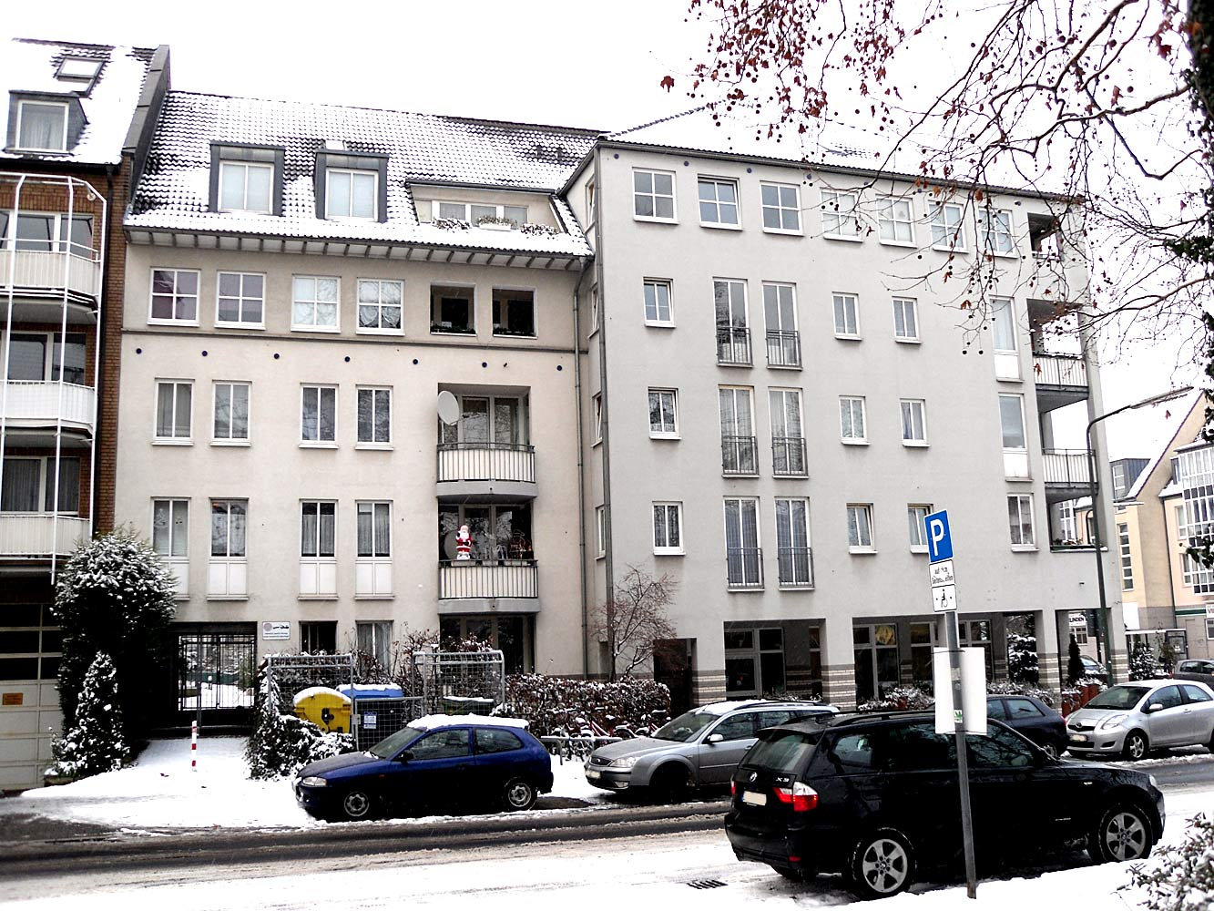 Weststrasse, 2. ru: Дюссельдорф-Бенрат, ул. Западная, дом 2.